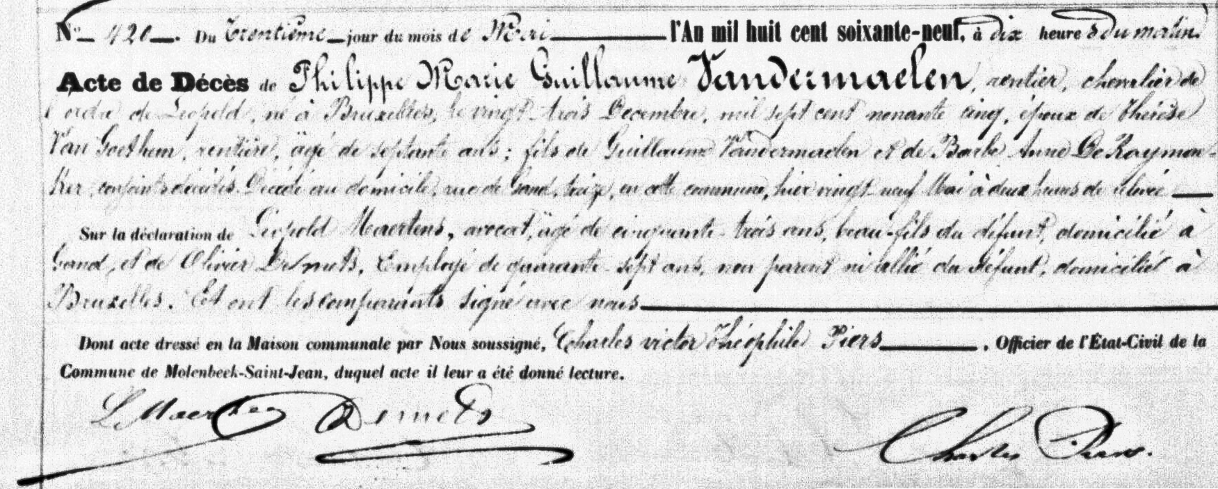 Acte de décès de Philippe Vandermaelen - Géographe belge